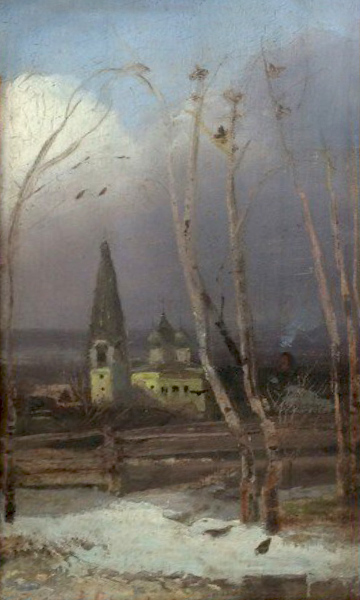 «Грачи прилетели». Этюд